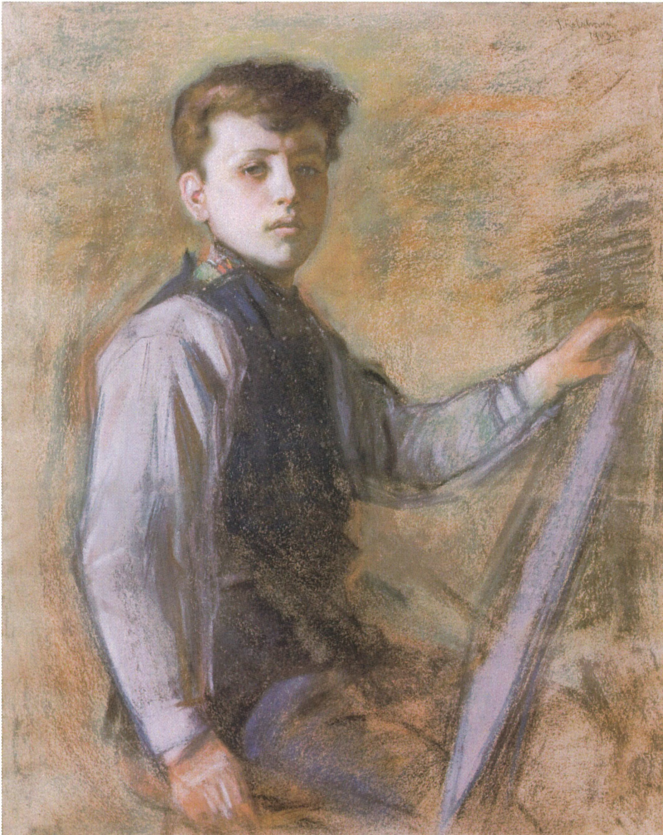 Il pittore di Chicago ritrae l'allievo dodicenne Federico Angeli - Pastello su carta - 91 x 70 - firmato e datato in alto a destra - Firenze Collezione Angeli